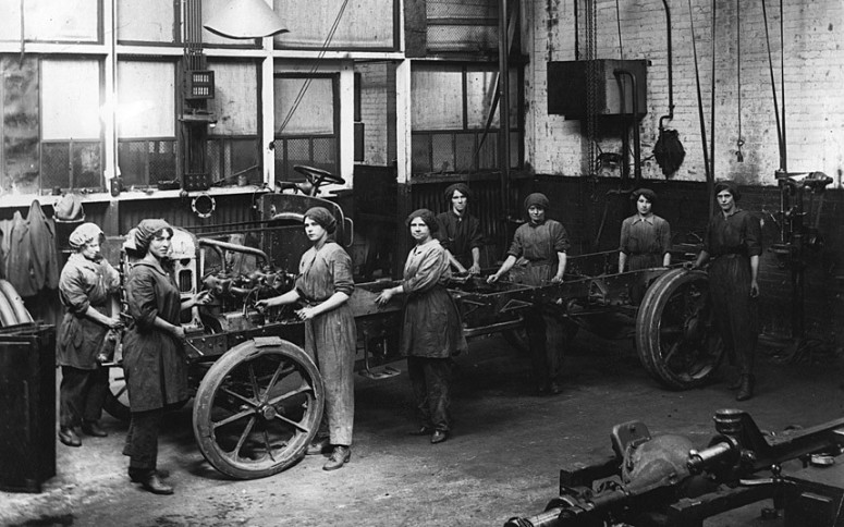 File:Women-navvies.jpg#/media/File:Women-navvies.jpg